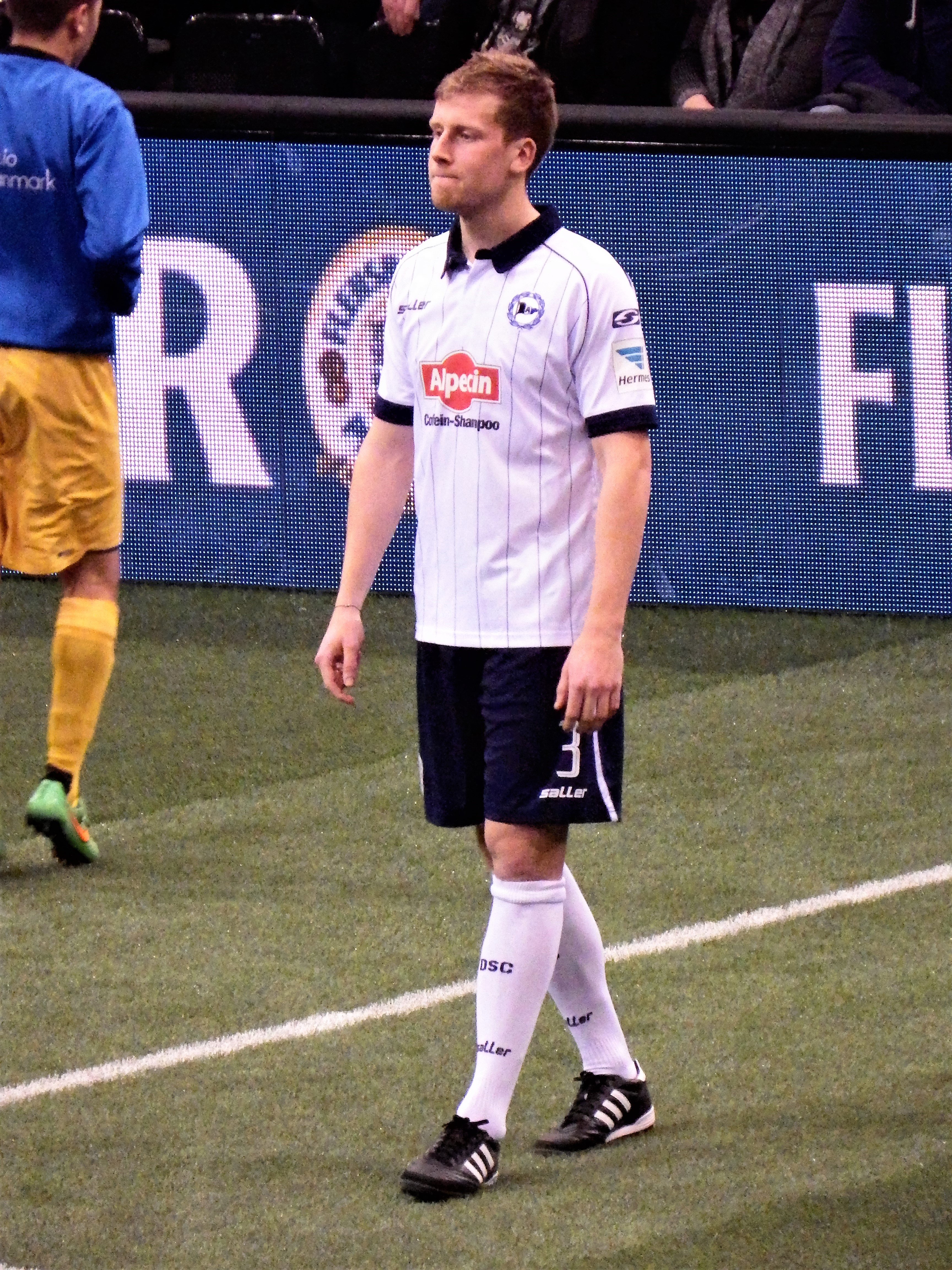 Brian Behrendt als Spieler von Bielefeld